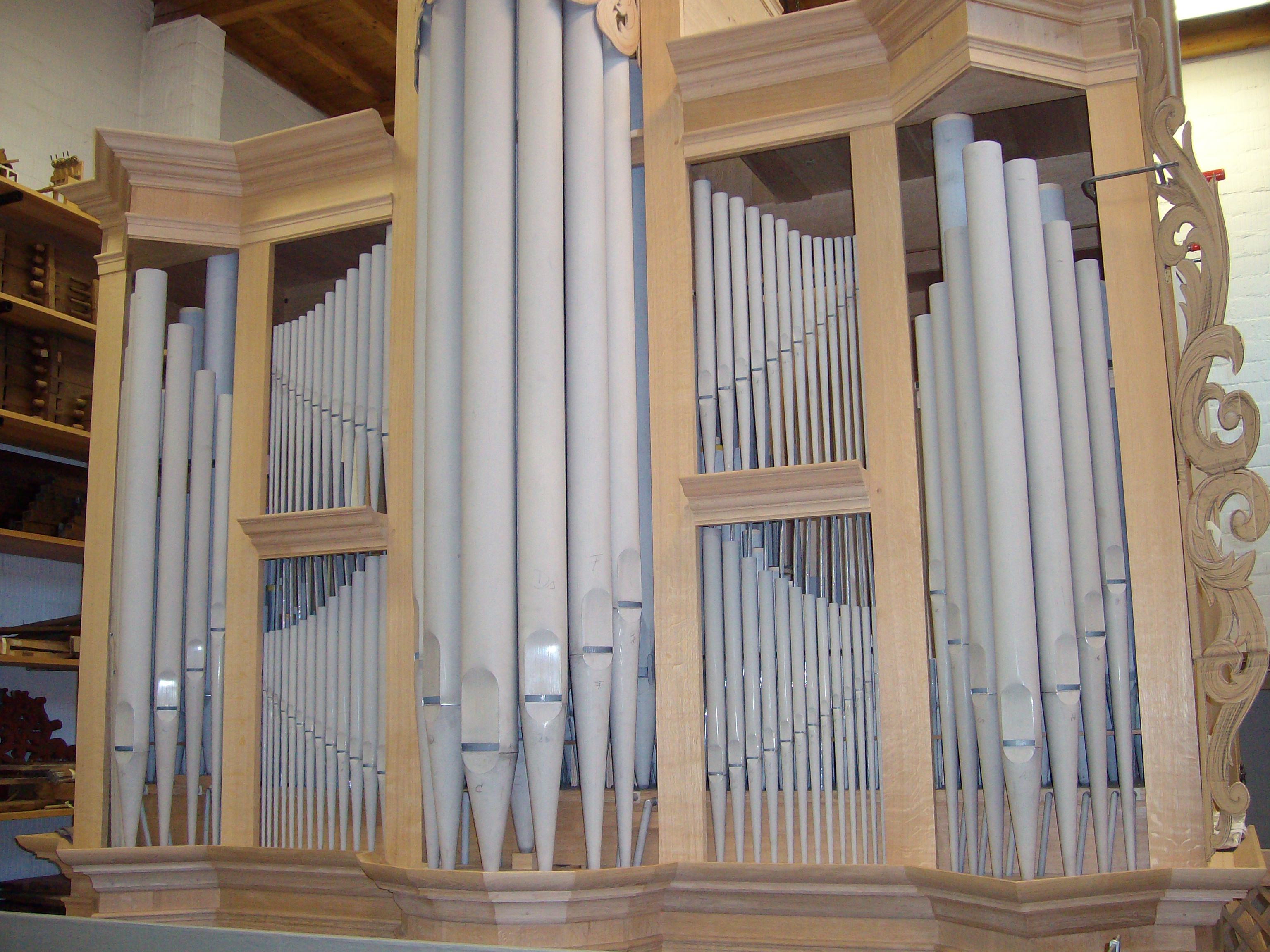 Prospekt der Orgel für die Zionskirche in Worpswede während des Neubaus in der Werkstatt Ahrend